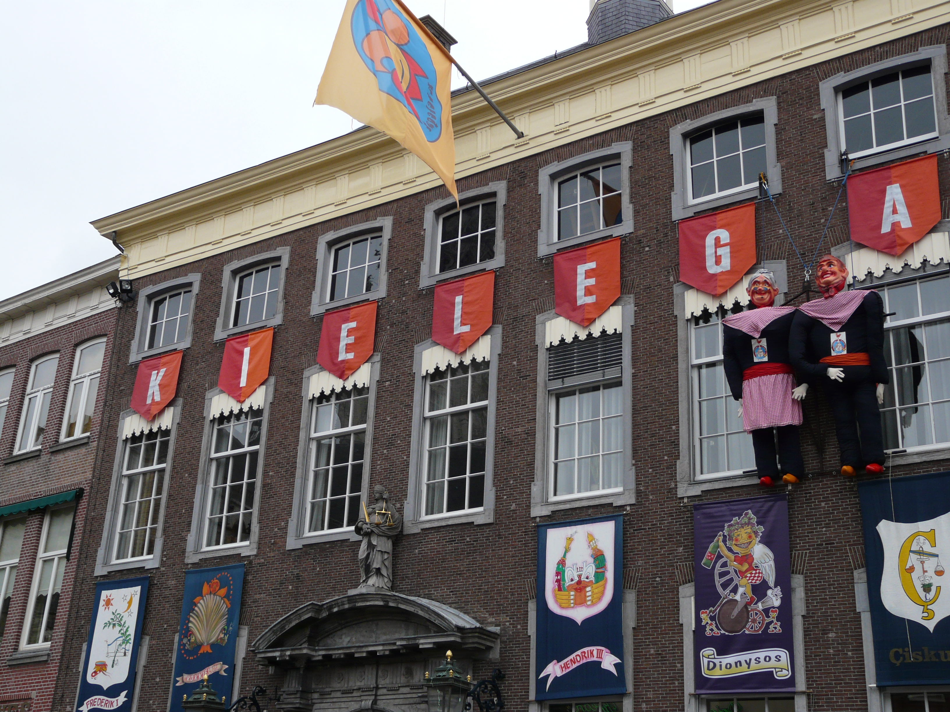 Zicht op een deel van het oude Stadhuis tijdens carnaval 2009